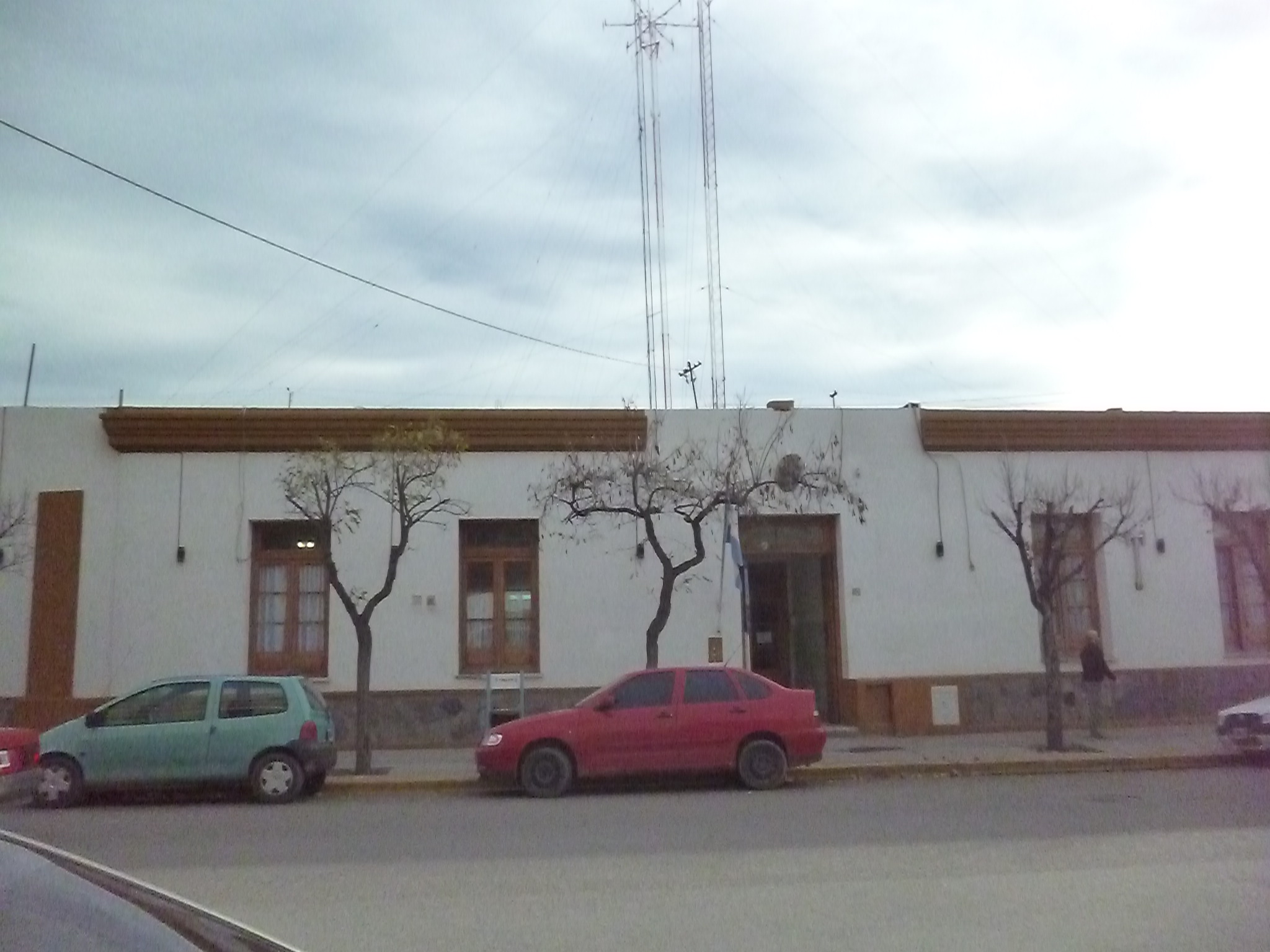 Comsaría primera de Trelew